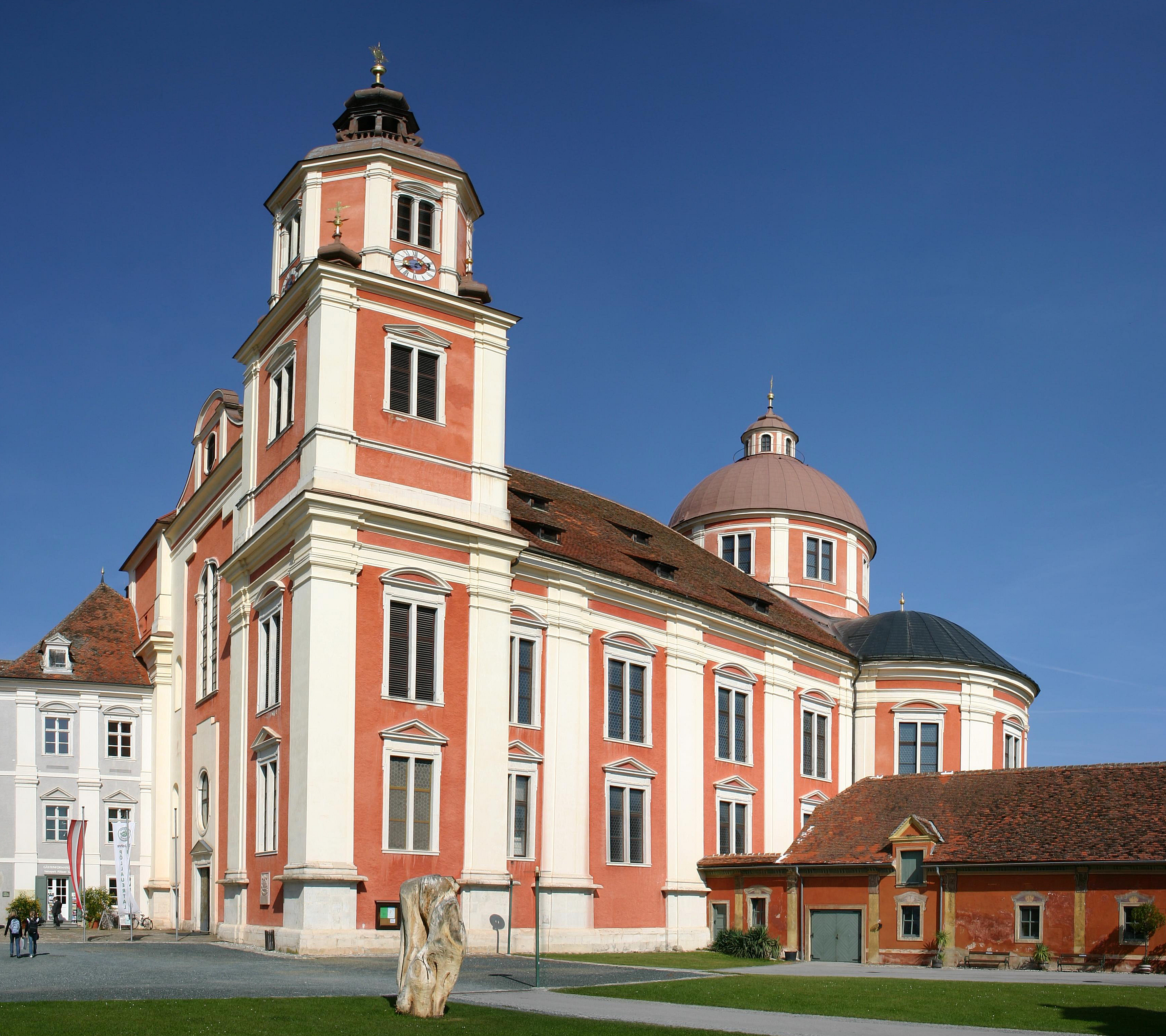 Pöllau – Stifts- und Pfarrkirche (zusammengesetzt aus 2 Einzelbildern)